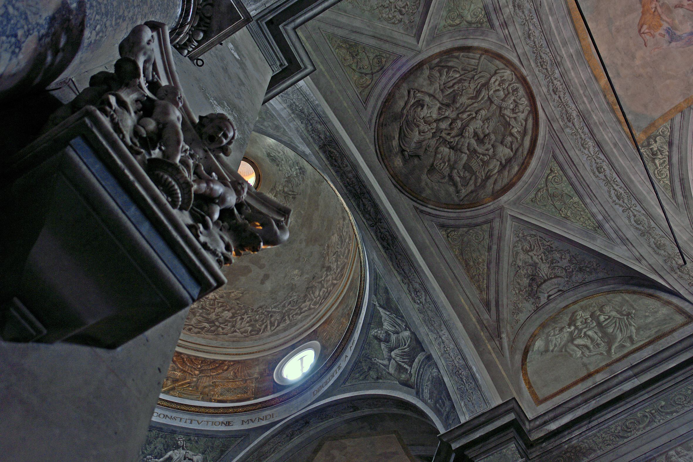 Pietrasanta, Pietrasanta, Dom, Kuppelblick